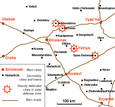 General Map of Smolensk Region